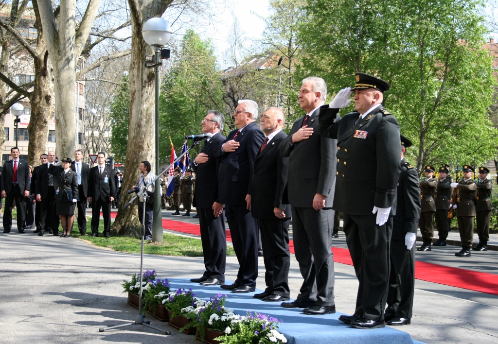 Svečanost podizanja NATO-ve zastave ispred zgrade MORH-a u Zagrebu.